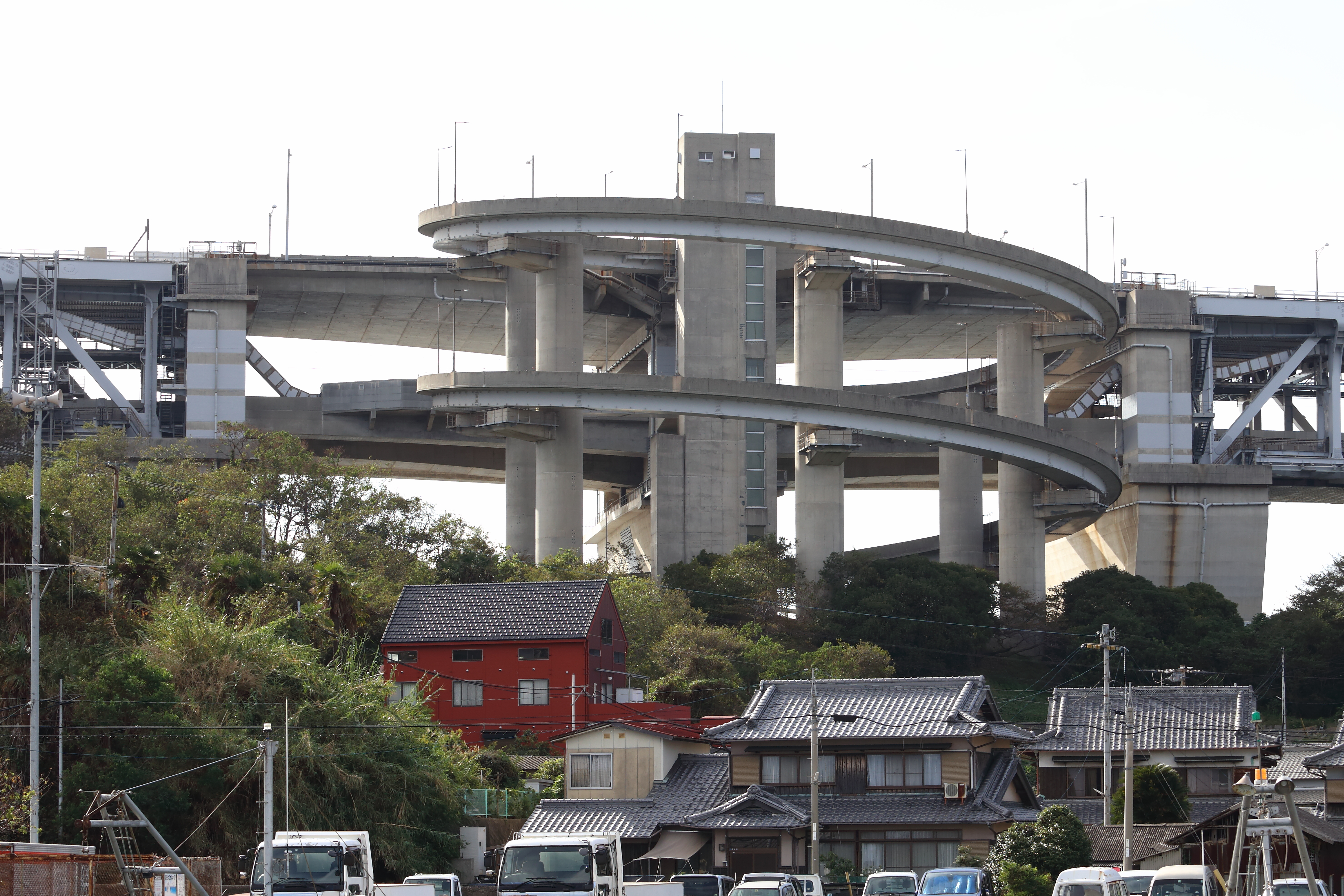 岩黒島高架橋 ※櫃石島橋と岩黒島橋の間の橋 岩黒島内だけに架かる高架橋 香川県坂出市岩黒